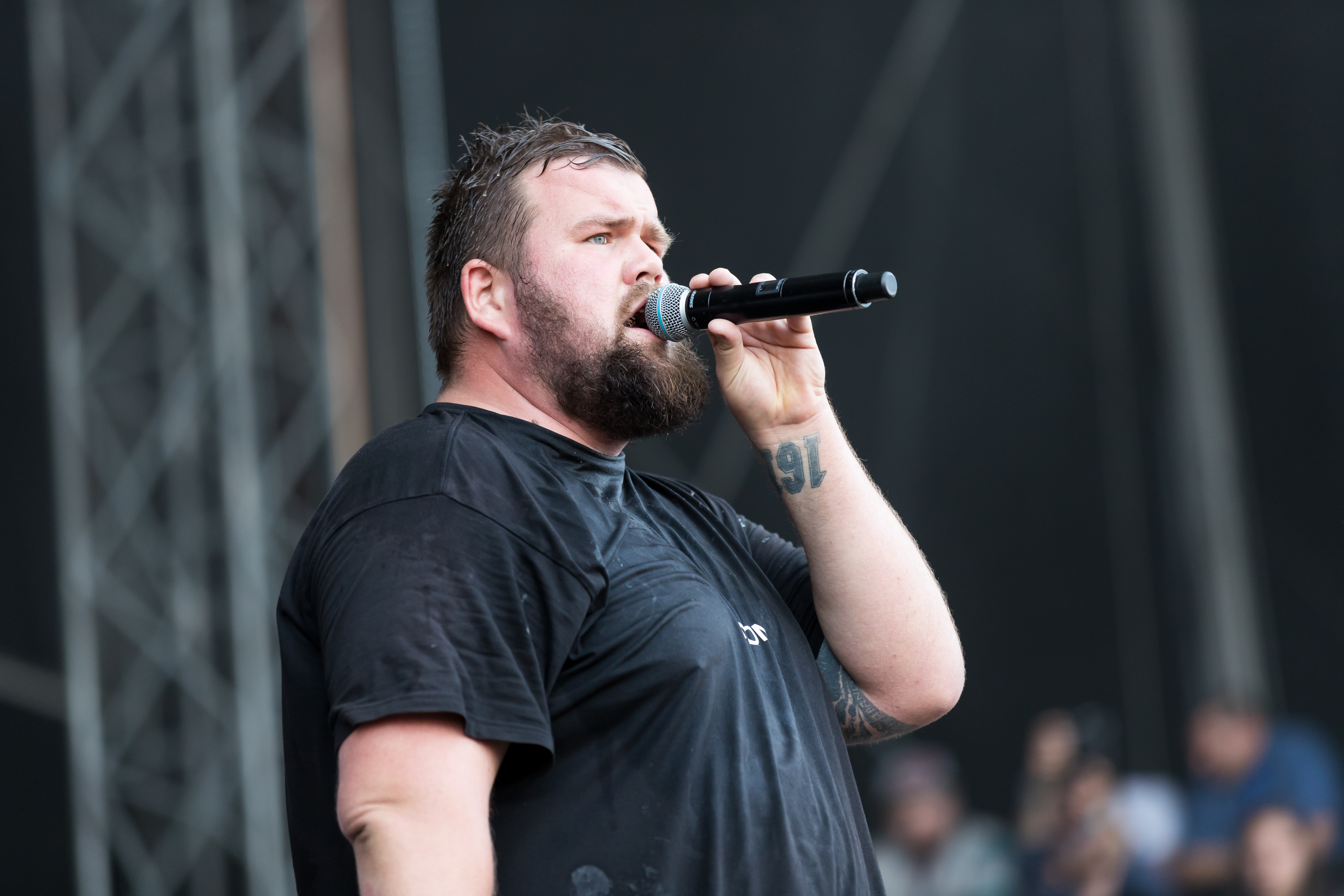 Feine Sahne Fischfilet during DAS FEST at Baden-Württemberg, Karlsruhe, , Germany on 2017-07-22, Photo: Sven Mandel